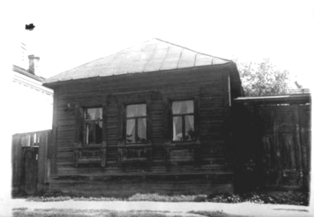 Дом, в котором в 1838 г. родился и жил до 1862 г. писатель-народник Ф.Д.Нефедов